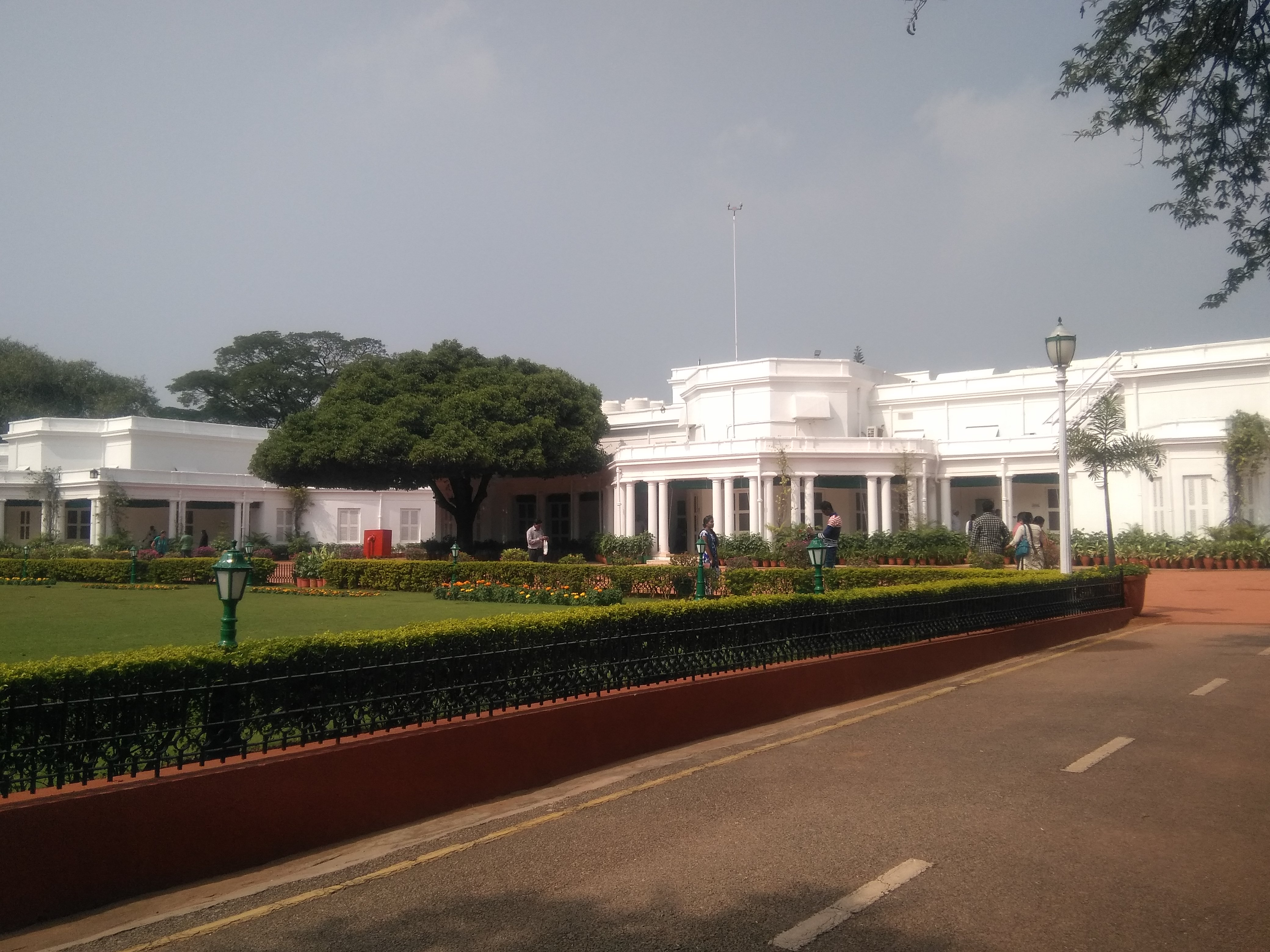 రాష్ట్రపతి నిలయం: సికింద్రాబాద్‌ బొల్లారంలోని రాష్ట్రపతి నిలయాన్ని సందర్శించేందుకు నగర ప్రజలకు మరోసారి అవకాశం వచ్చింది. శీతాకాల విడిది కోసం రాష్ట్రపతి నిలయానికి వచ్చిన రామ్‌నాథ్‌ కోవింద్‌ ఇక్కడి అందాలను, ప్రకృతి శోభితాన్ని ప్రజలు కూడా చూడటానికి అవకాశం కల్పించారు. మొదటిసారిగా రాష్ట్రపతి ప్రతిభాపాటిల్‌ ఈ విధానానికి శ్రీకారం చుట్టారు. ఆహ్లాద పరిచే ఉద్యానవనాలు, ఔషధ మొక్కలు, పండ్ల తోటలు, పూల తోటలు, చుట్టూ పచ్చద నంతో రాష్ట్రపతి నిలయం ప్రత్యేక ఆకర్షణగా ఉంటుంది. ప్రతిభా పాటిల్‌ వరుసగా ఐదుసార్లు ఈ నిలయానికి వచ్చారు. వచ్చిన ప్రతిసారి ఆమె ఈ నిలయాన్ని చూడటా నికి ప్రజలకు అవకాశాన్ని కల్పించారు. ఆ ఆనవాయితీని రాష్ట్రపతి ప్రణబ్‌ ముఖర్జీ పాటించారు. ప్రస్తుత రాష్ట్రపతి రామ్‌నాథ్‌ కోవింద్‌ కూడా మాజీ రాష్ట్రపతుల మాదిరిగానే నగరంలోని రాష్ట్రపతి నిలయాన్ని సందర్శించే అవకాశం కల్పించారు. 1860లో నిజాం నవాబు నజీరుద్దీన్‌ల రాష్ట్రపతి నిలయాన్ని నిర్మించారు. 90 ఎకరాల్లో, 2,500 చదరపు మీటర్ల విస్తీర్ణంలో ఈ భవనం నిర్మించారు. ఇందులో మూడు ప్రధాన విభాగాలు ఏర్పాటు చేశారు. రాష్ట్రపతి కుటుంబ సభ్యుల కోసం, ఏడీసీ విభాగా లుగా విభజించారు. నిలయం పరిసర ప్రాంతాలలో మరో 20 గదులు ఉన్నాయి. పెద్ద పెద్ద వృక్షాలు, వివిధ రకాల పండ్ల తోటలు, ఔషధ మొక్కల వనం, వివిధ రకాల పూల తోటలు రాష్ట్రపతి నిలయాన్ని అందంగా తీర్చిదిద్దుతున్నాయి. వంటశాల నుంచి రాష్ట్రప తి నిలయం వరకు ఉన్న మార్గం సర్వాంగ సుందరంగా ఉంటుంది. ప్రధాన ద్వారం, డైనింగ్‌ హాల్‌, ఫౌంటెన్‌లు చూడదగినవి. ఉదయం 10 గంటల నుంచి 4 గంటల వరకు.. రాష్ట్రపతి నిలయాన్ని సందర్శకులు వీక్షించడానికి డిసెంబర్‌ 26వ తేదీ నుంచి జనవరి 6వ తేదీ వరకు 12 రోజుల పాటు అవకాశం కల్పించారు.